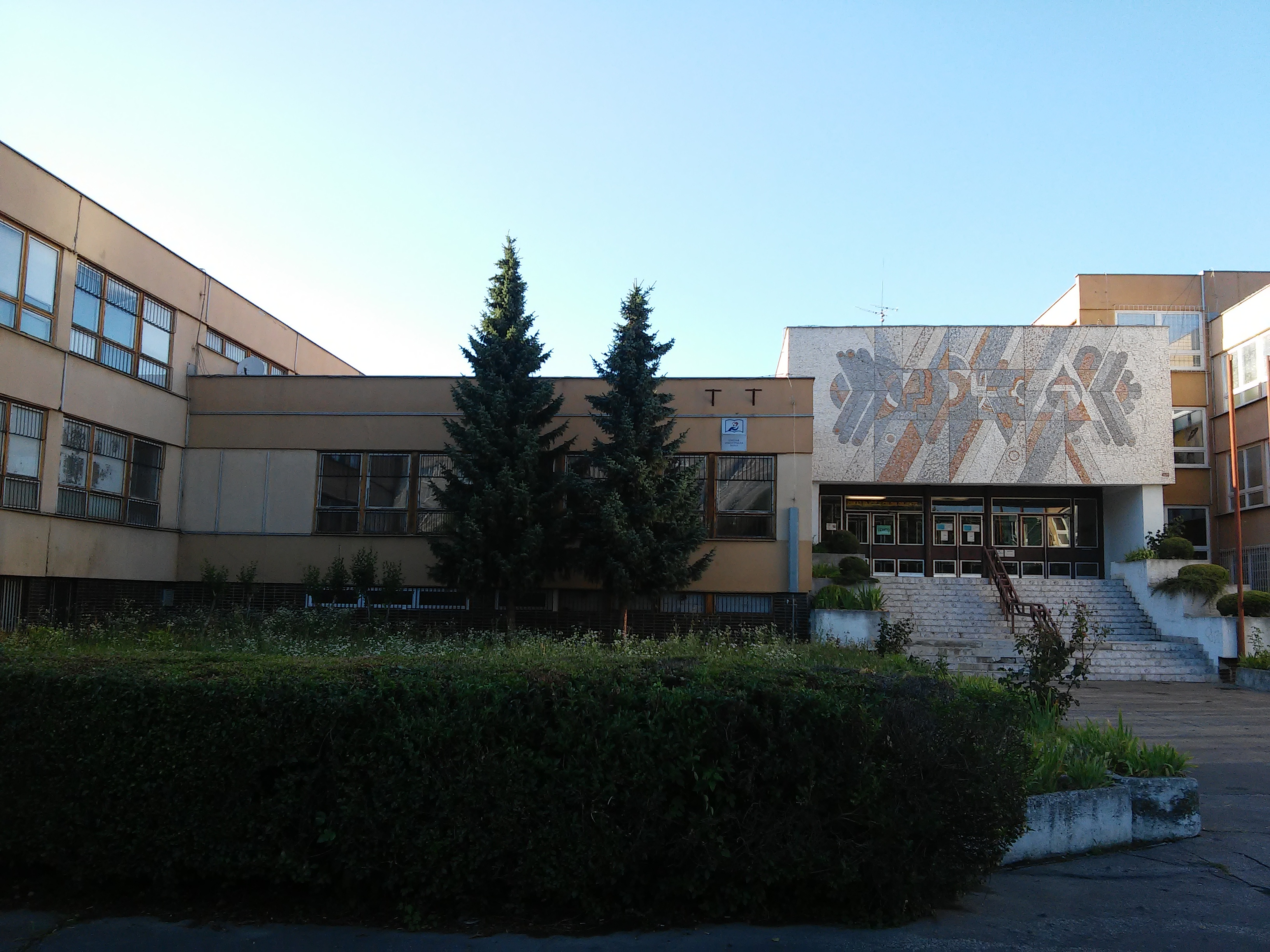 Strečnianska 20, Petržalka, Bratislava